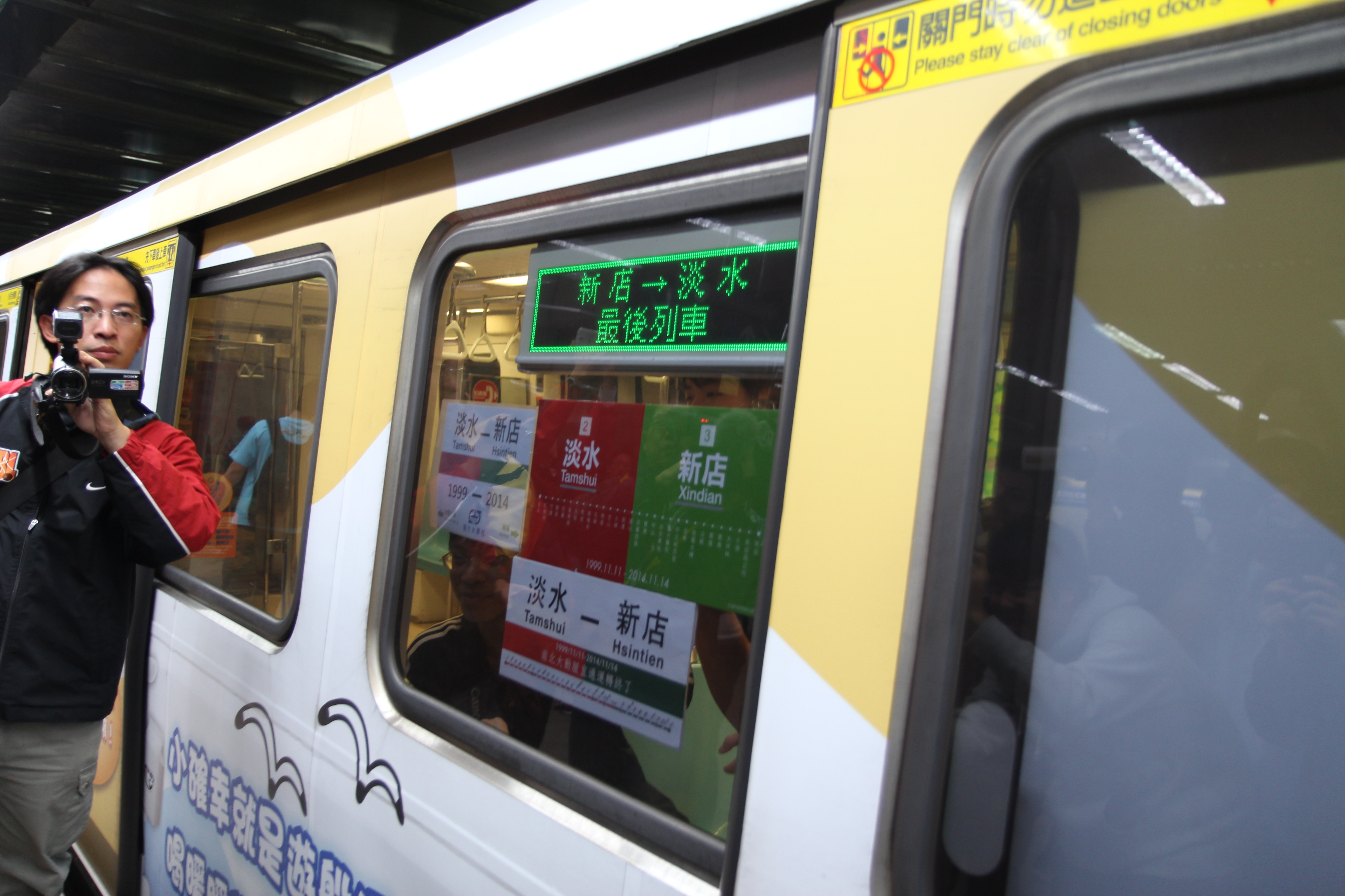 2014年11月15日凌晨，臺北捷運淡水線～新店線直通最後列車。